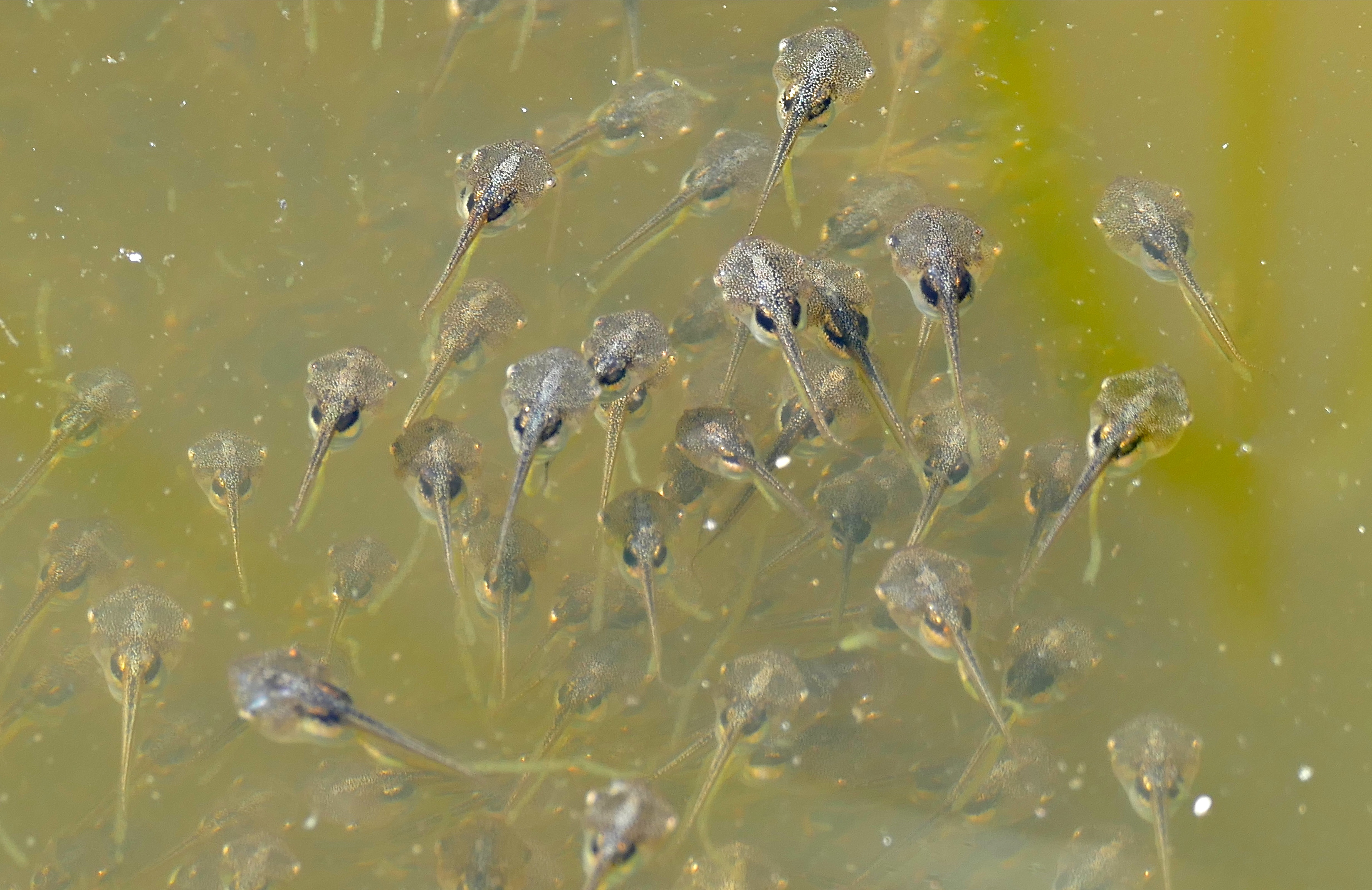 Kruger Tablets, H1-2 Road West of Tshokwane, Kruger NP, SOUTH AFRICA